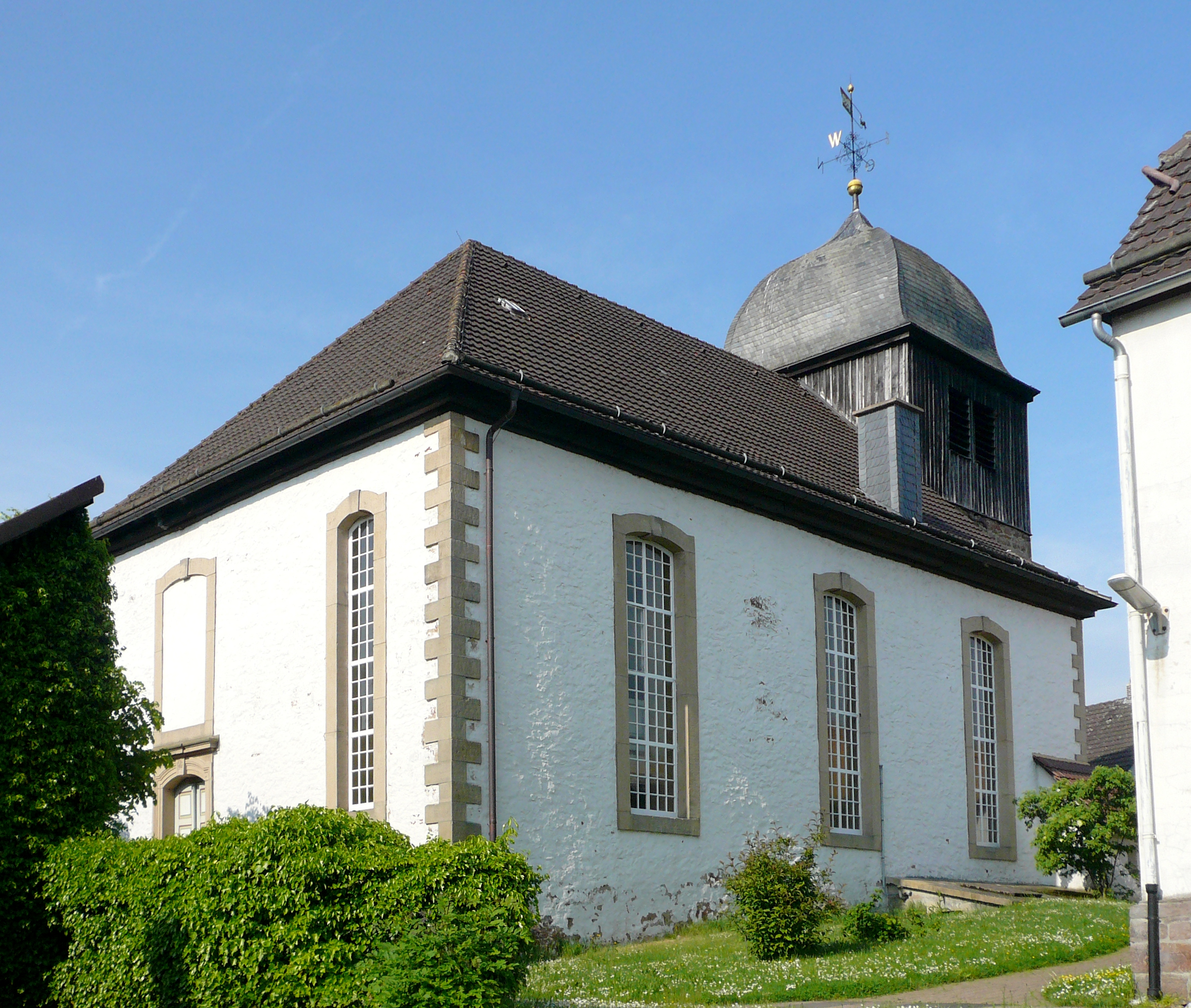 Ev.-luth. Kirche St. Vitus in Schoningen, Stadt Uslar, Niedersachsen. Turm mittelalterlich, Kirchenschiff 1729-1737 von der Familie von Hattorf gestiftet, Turmdach 1882